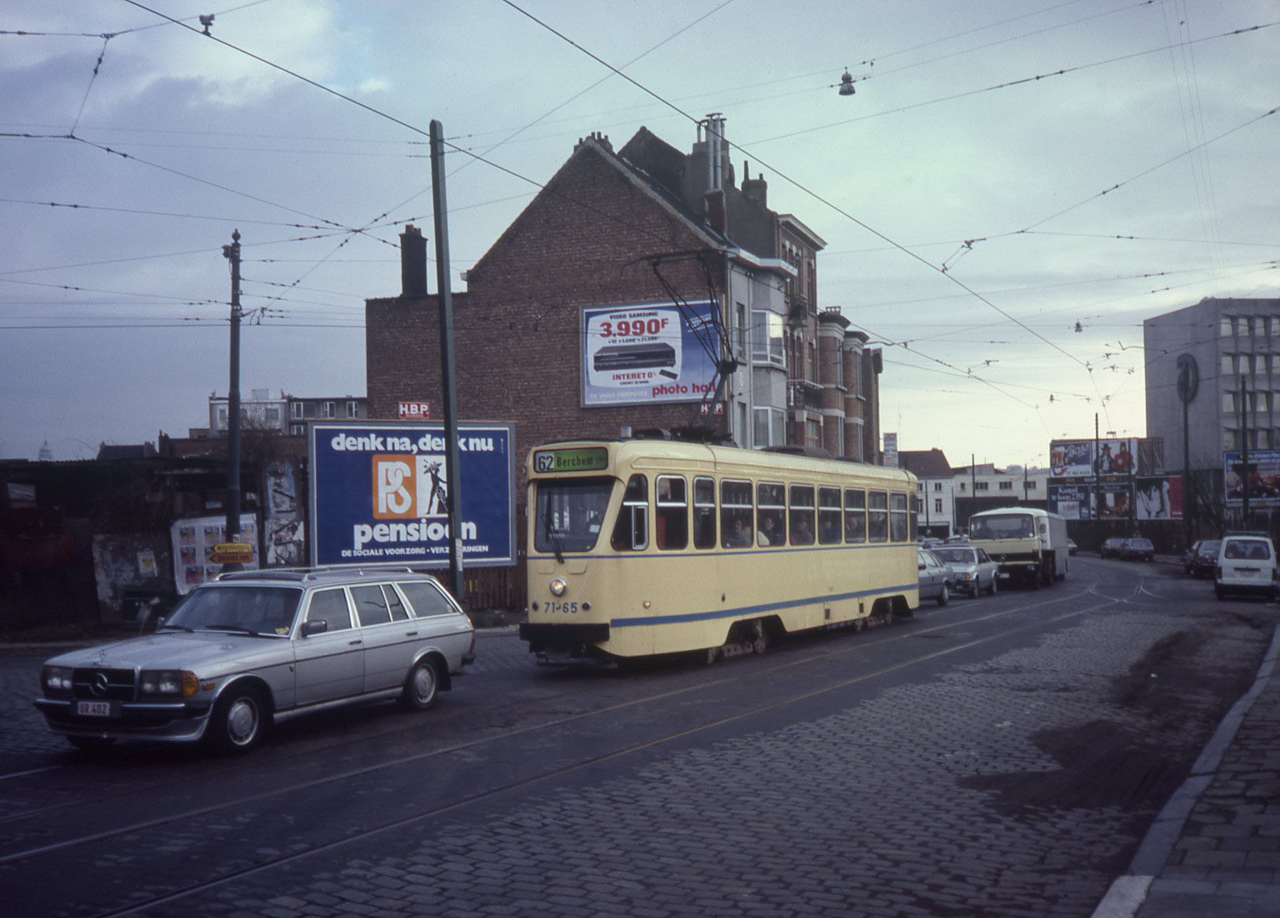 Een tram van lijn 62 in de Nicolas Doyenstraat. Deze tramlijn is nu opgeheven.